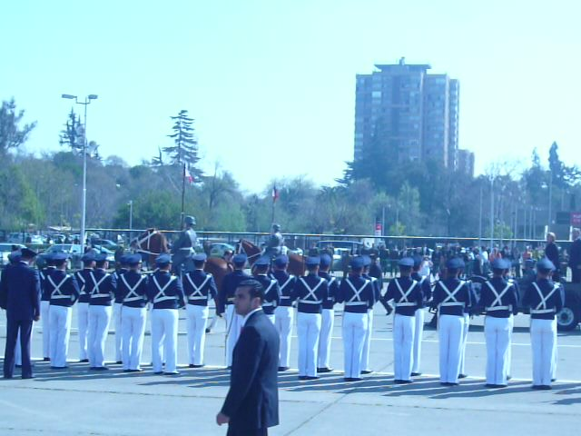 Parada militar 2008 Santiago